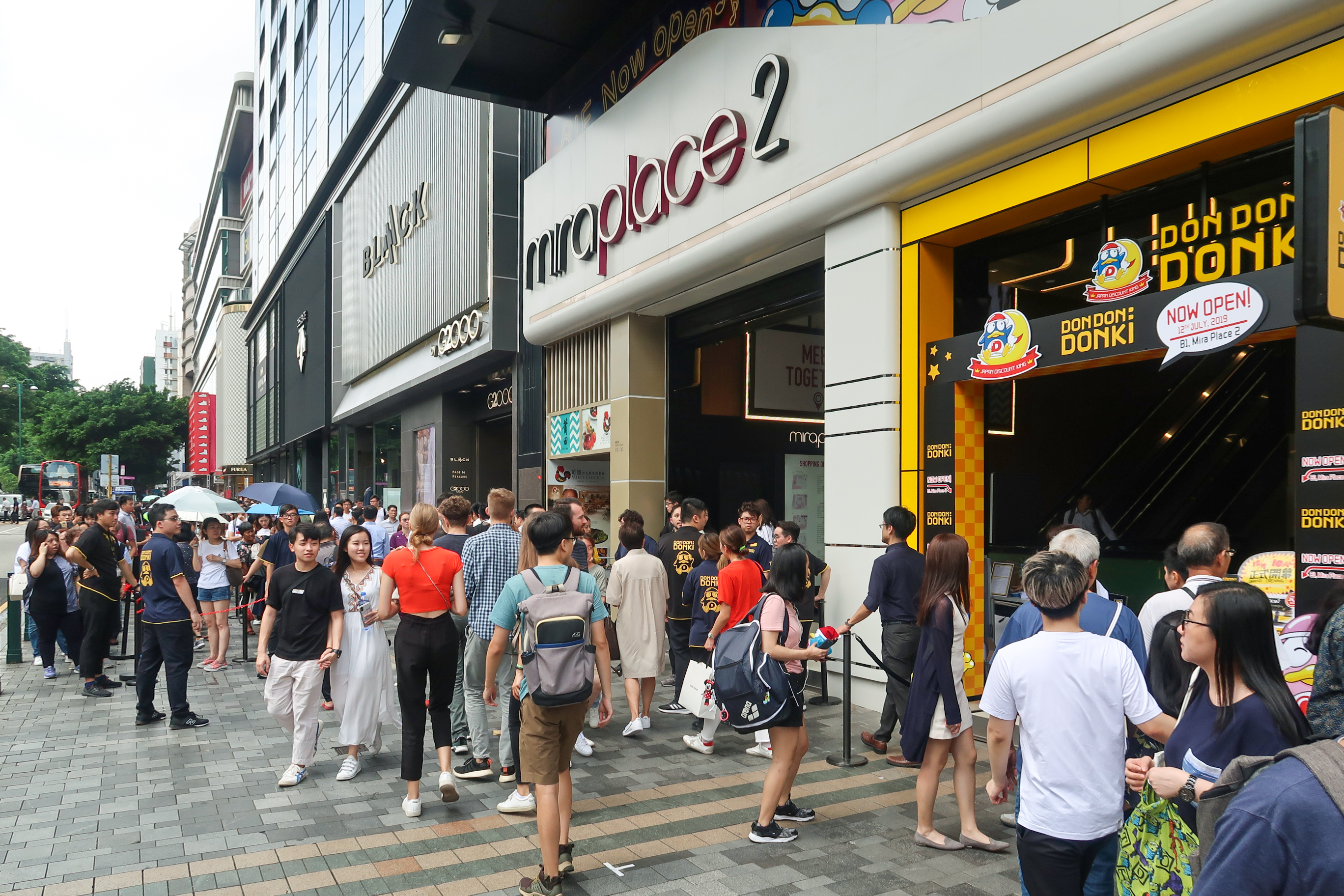 Don Don Donki Hong Kong opening queue